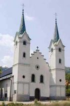 Crkva Uznesenja Marijina ,Dolac, Travnik